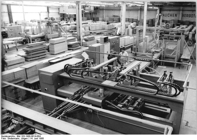 Ribnitz-Damgarten, Möbelfabrik, Werkhalle ADN-ZB Sindermann 14.6.88 Bez. Rostock: Jugend- Täglich werden im Stammbezirk des Möbelkombinates Ribnitz-Damgarten 1 400 Festmeter Holz verarbeitet. Aus ihnen entstehen hochwertige hart- und mitteldichte Faserplatten, die in zahlreichen Betrieben der fünf DDR-Möbelkombinate zu modernen Wohn- und Schlafraumeinrichtungen verarbeitet werden. Die moderne CNC-gesteuerte Maschinenanlage zur Herstellung von Möbelbauteilen läßt sich innerhalb von 15 Minuten auf ein neues Bauteil umstellen. - siehe auch 1988-0614-3N